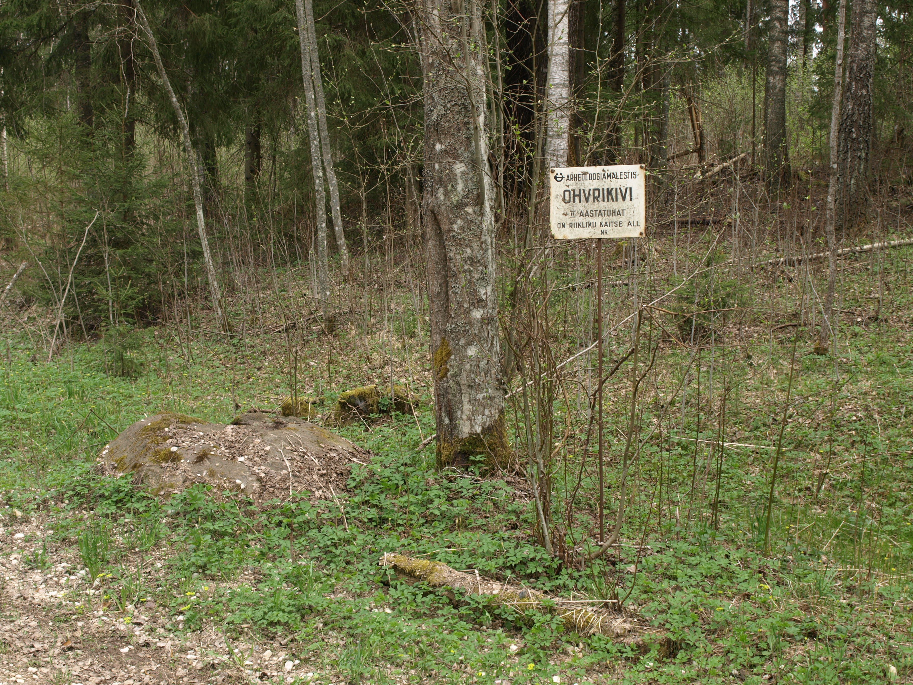 Ohvrikivi